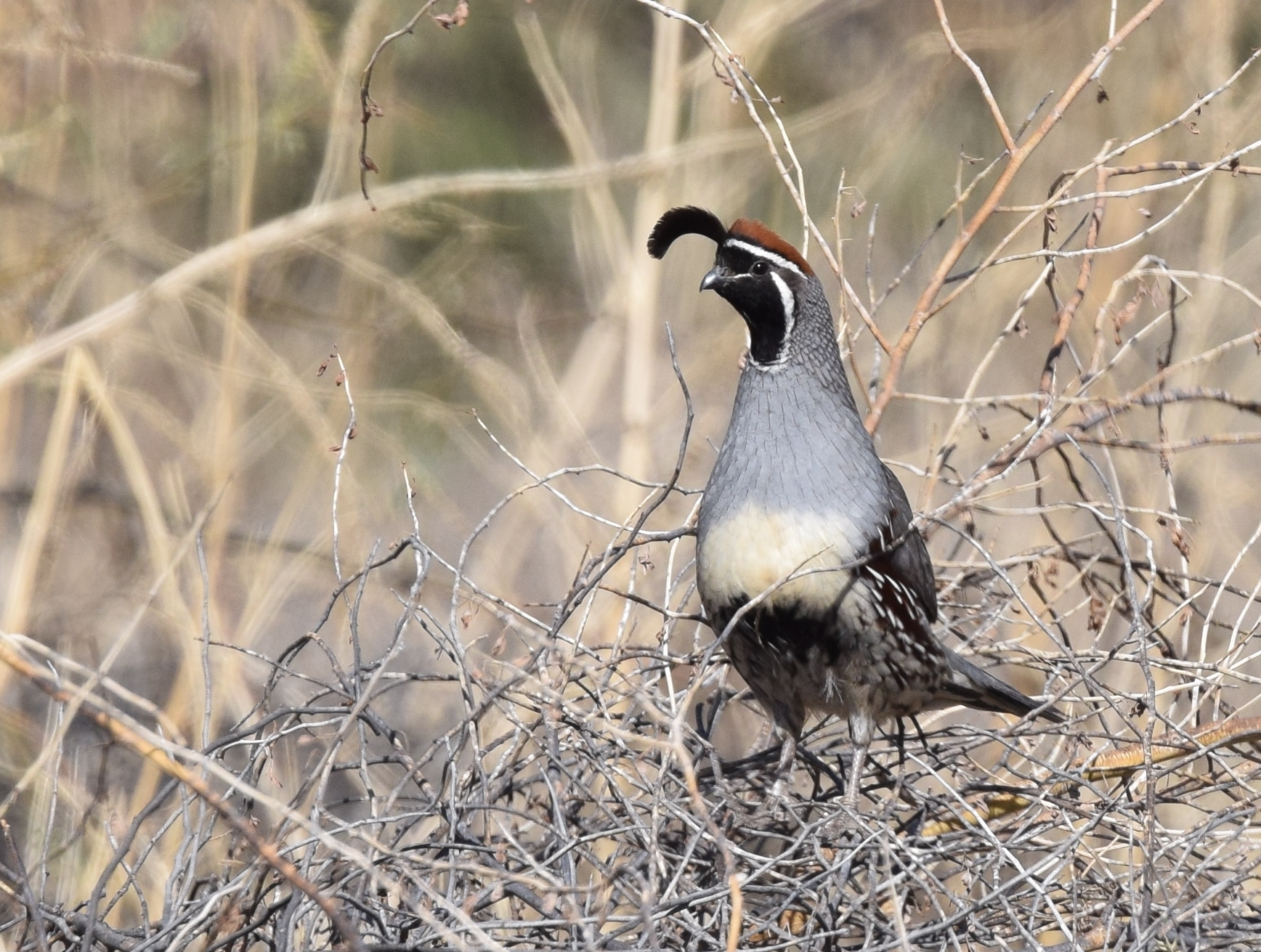 Day 4 (part 1) April 1, 2017 Arizona